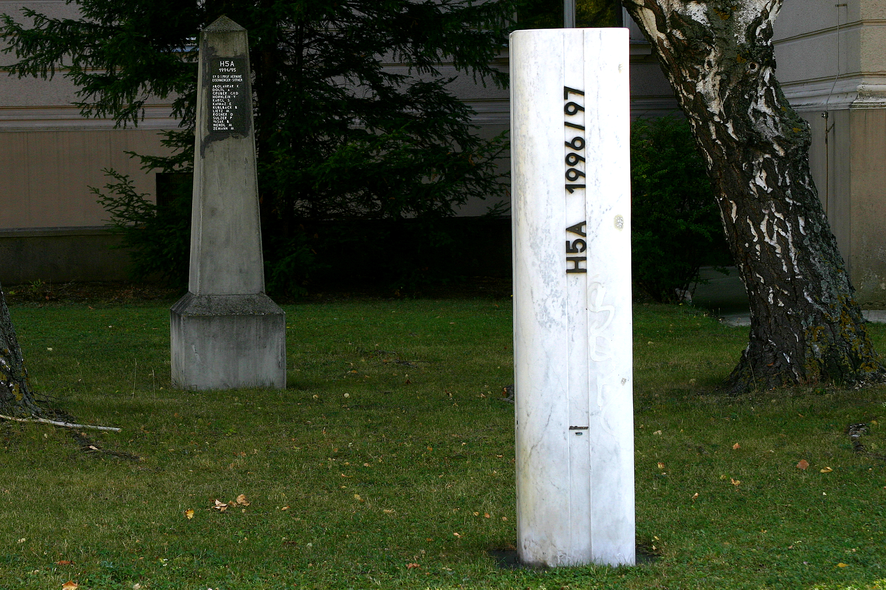 Grabsteine vor der HTL Mödling. Sie wurden von Absolventen der Schule errichtet.